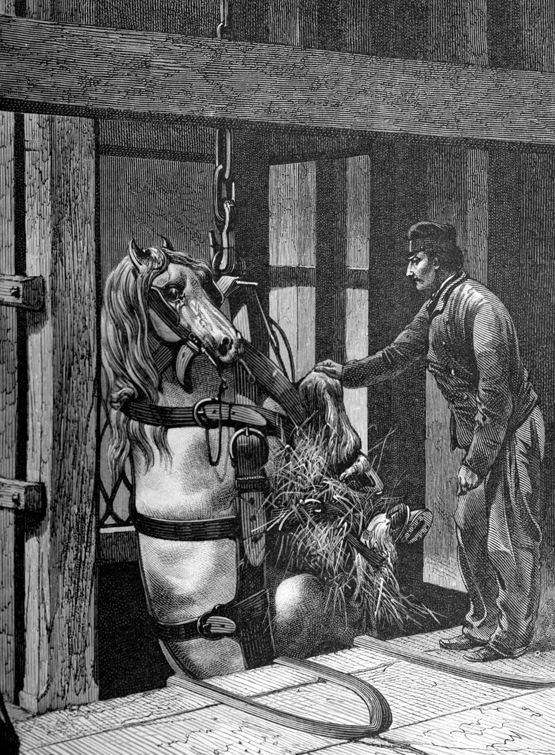 Herablassen eines Grubenpferdes in einer Mine in Frankreich